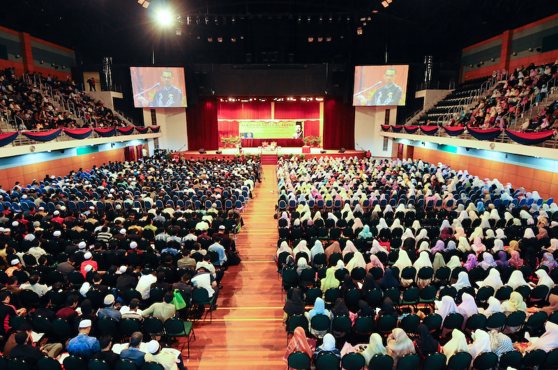 Konvensyen Pemikiran Imam Hasan Al-Banna Dalam Melakar Agenda